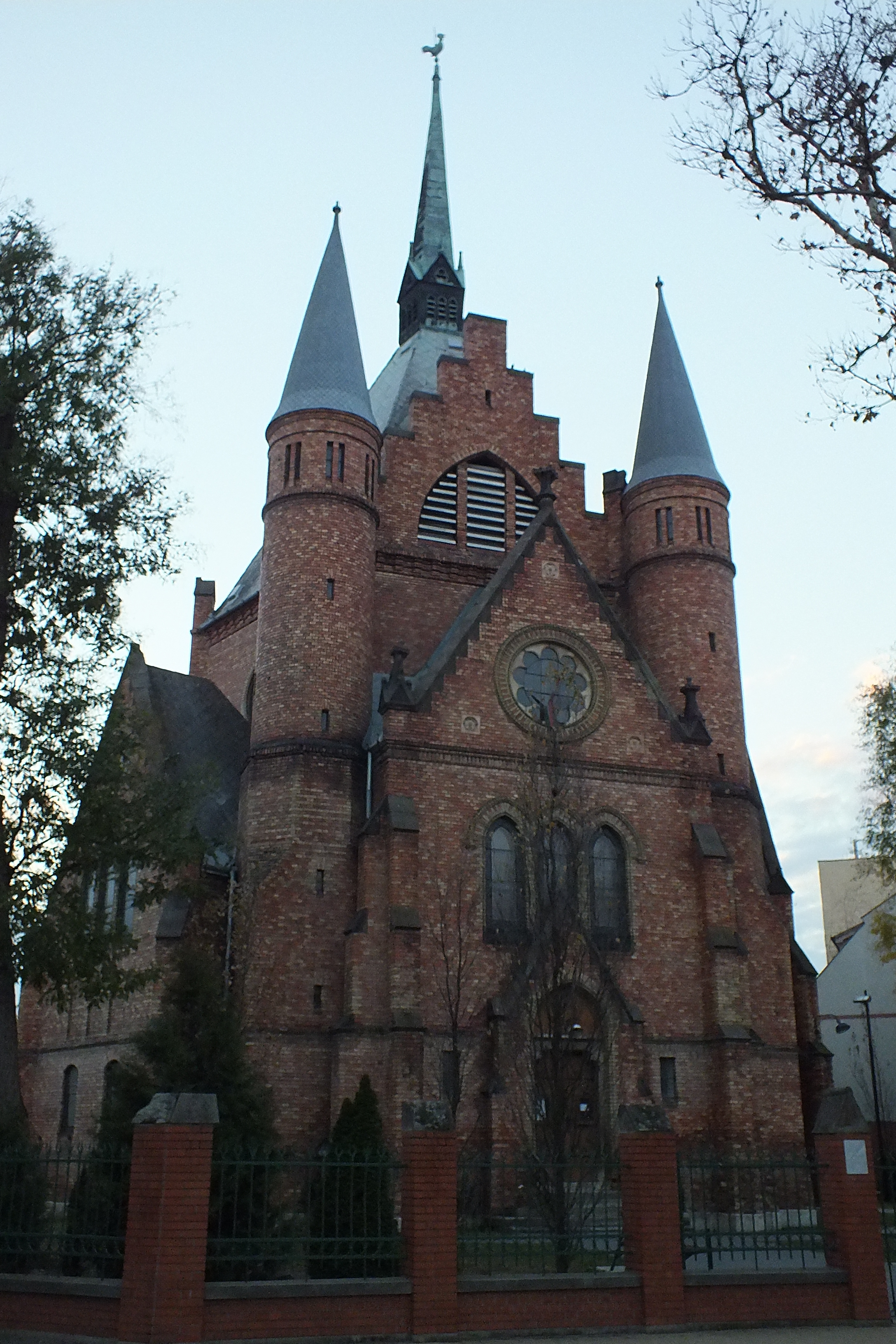 реформатська церква в місті Сольнок